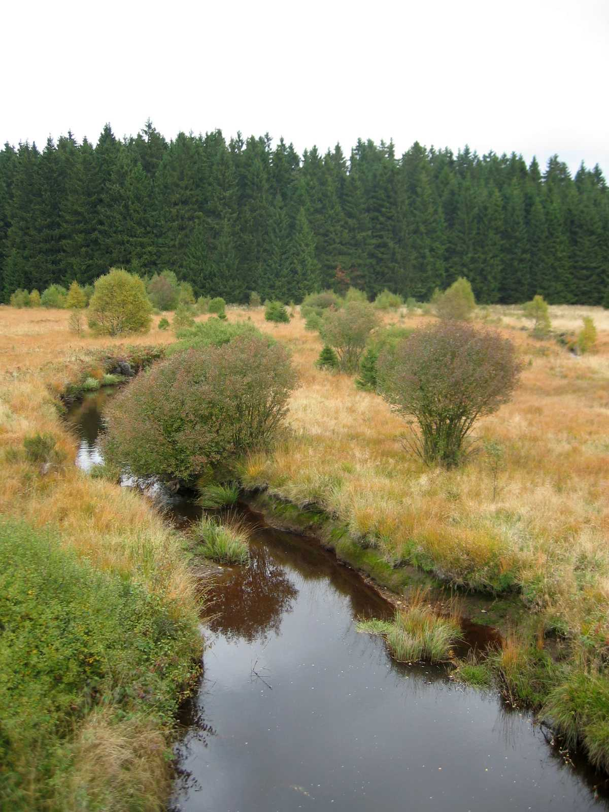 Die junge Rur im Herzogen Venn zwischen Sourbrodt und Kalterherberg